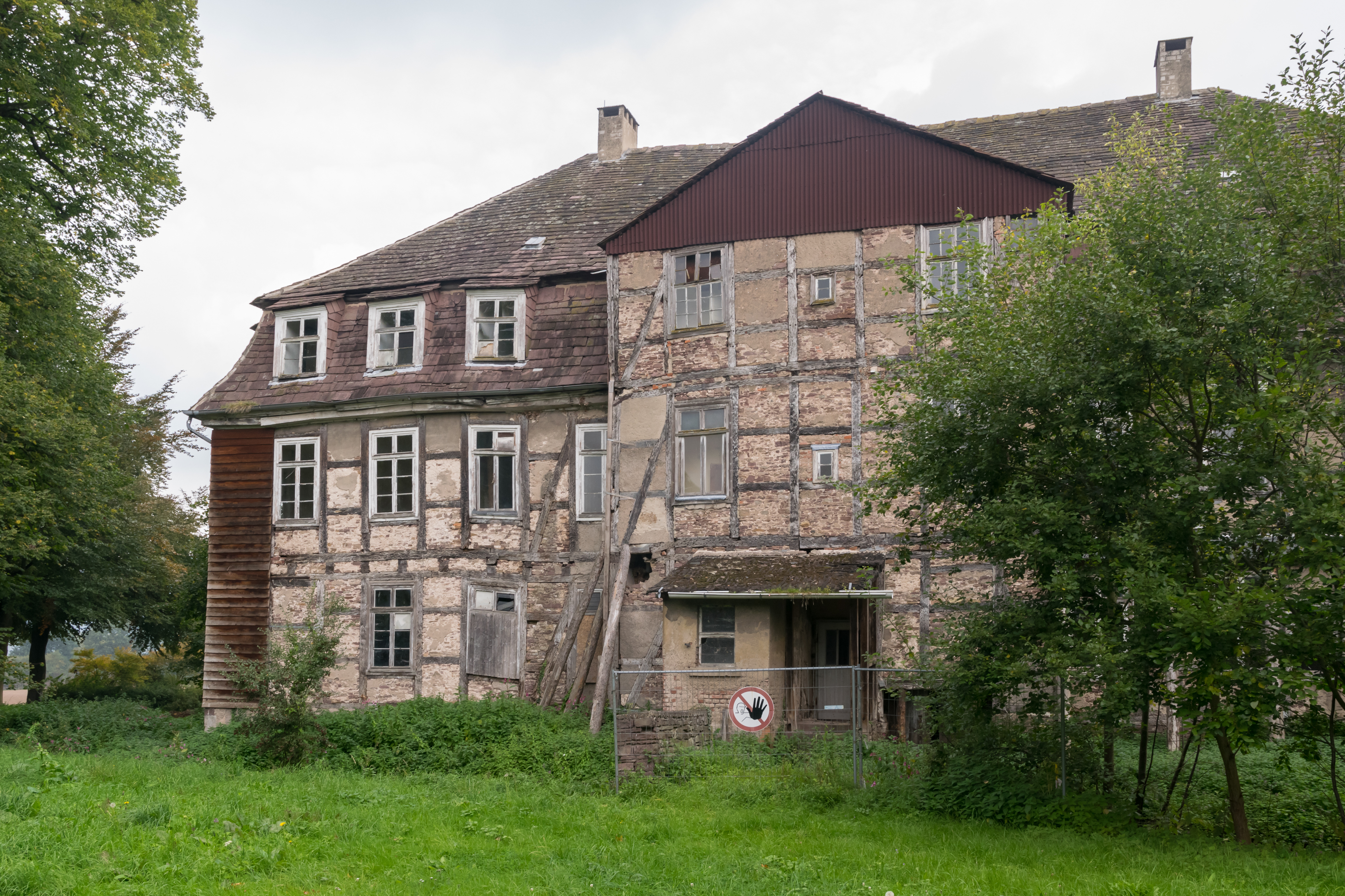 Dreizehnlindenhaus, ehemaliges Gasthaus von Corvey